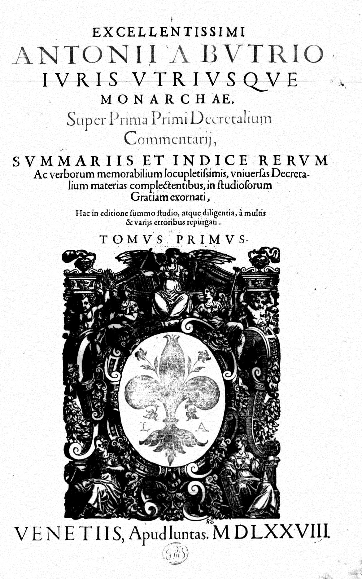 Frontespizio